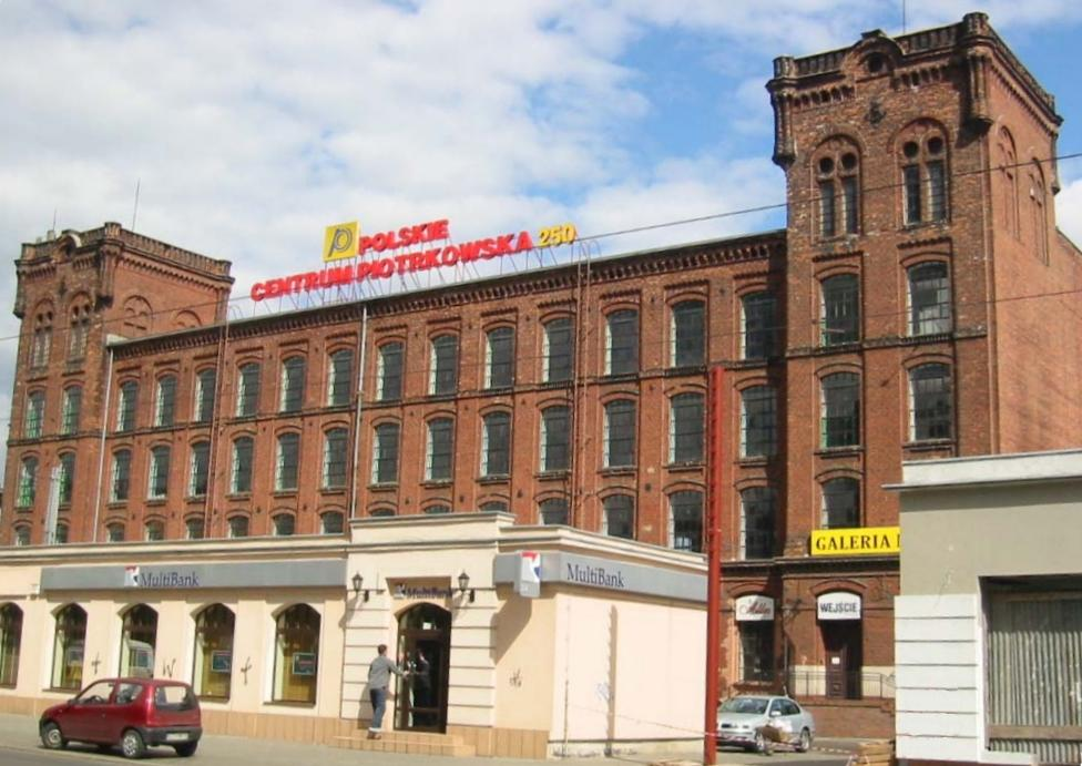 Markus Silbersteins fabrik ved Piotrkowska-gaden.